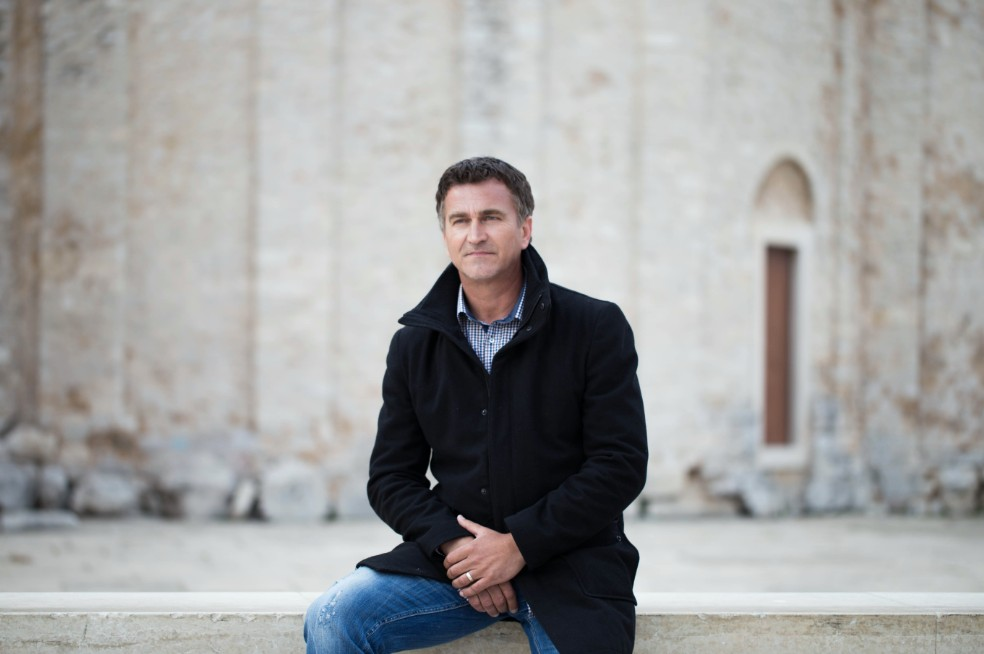 Ivica Sikirić